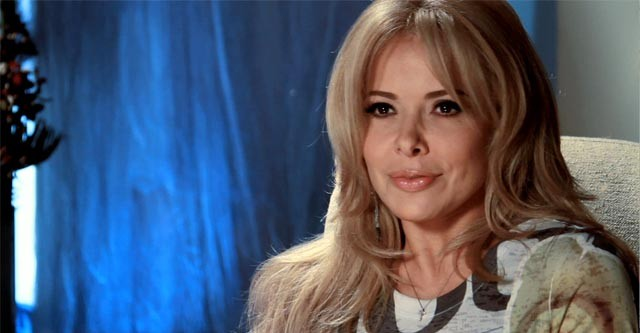 Gloria Trevi en Acceso Total, 28 de febrero, 2011.